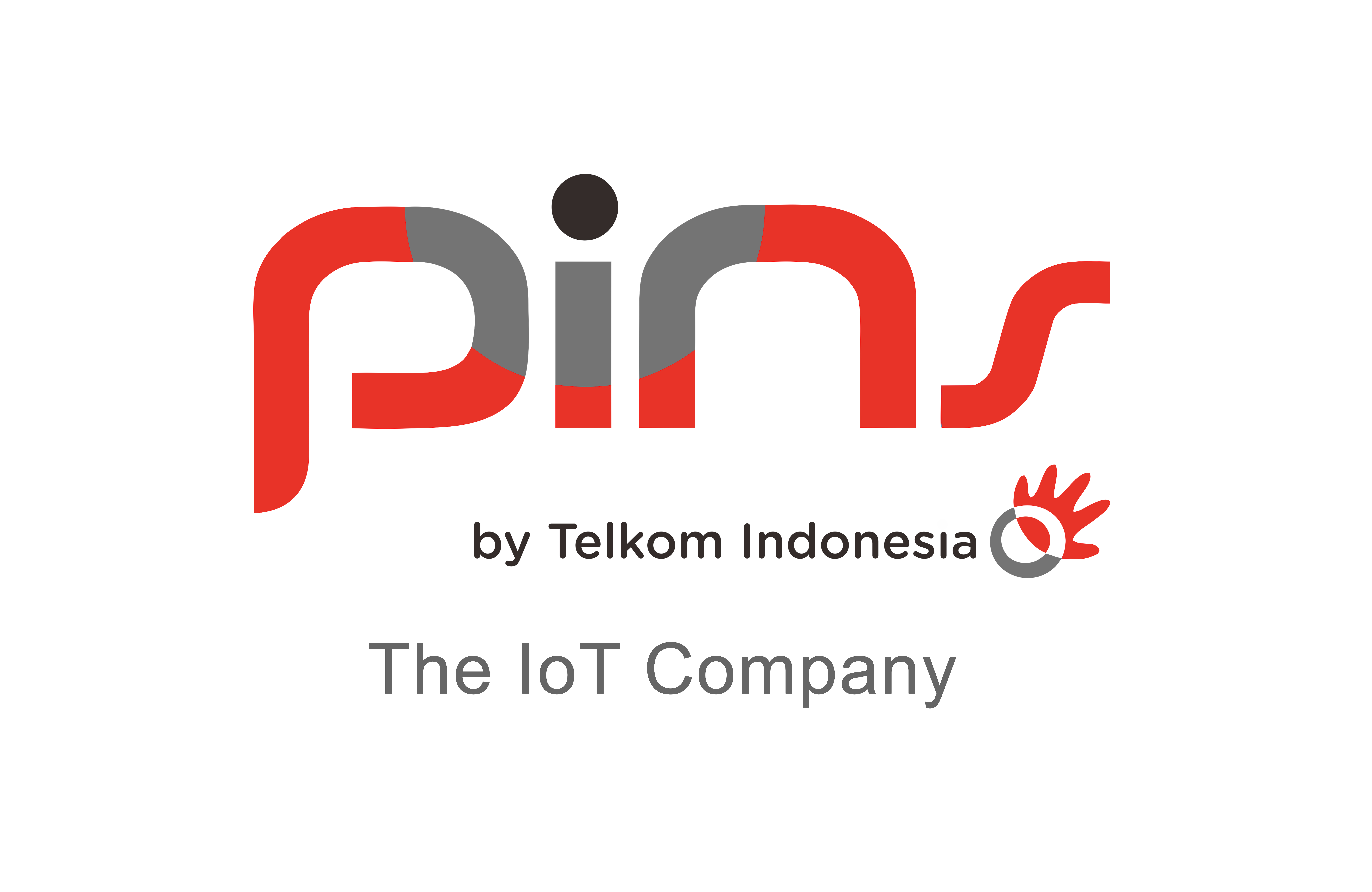 Logo PT PINS INDONESIA